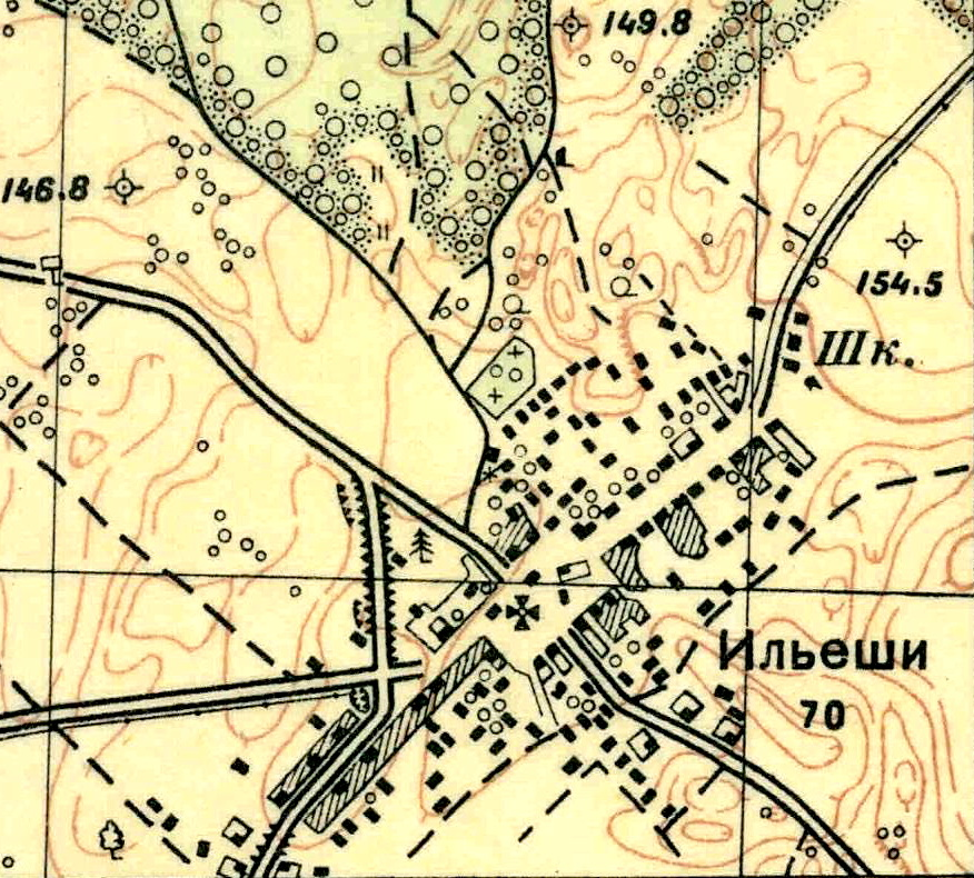 Топографическая карта Ленинградской области, квадрат О-35-23-А-в (Бол. Карчаны), деревня Ильеши